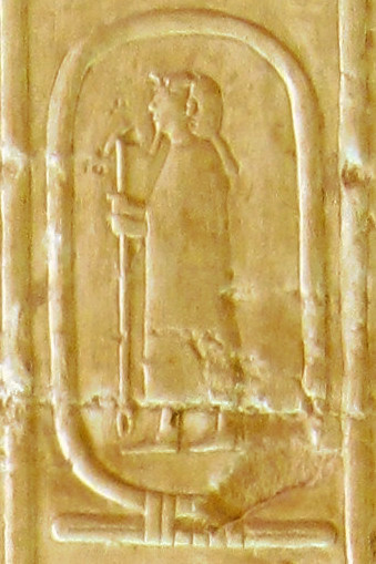 Königsliste im Totentempel Sethos I. in Abydos, Ägypten